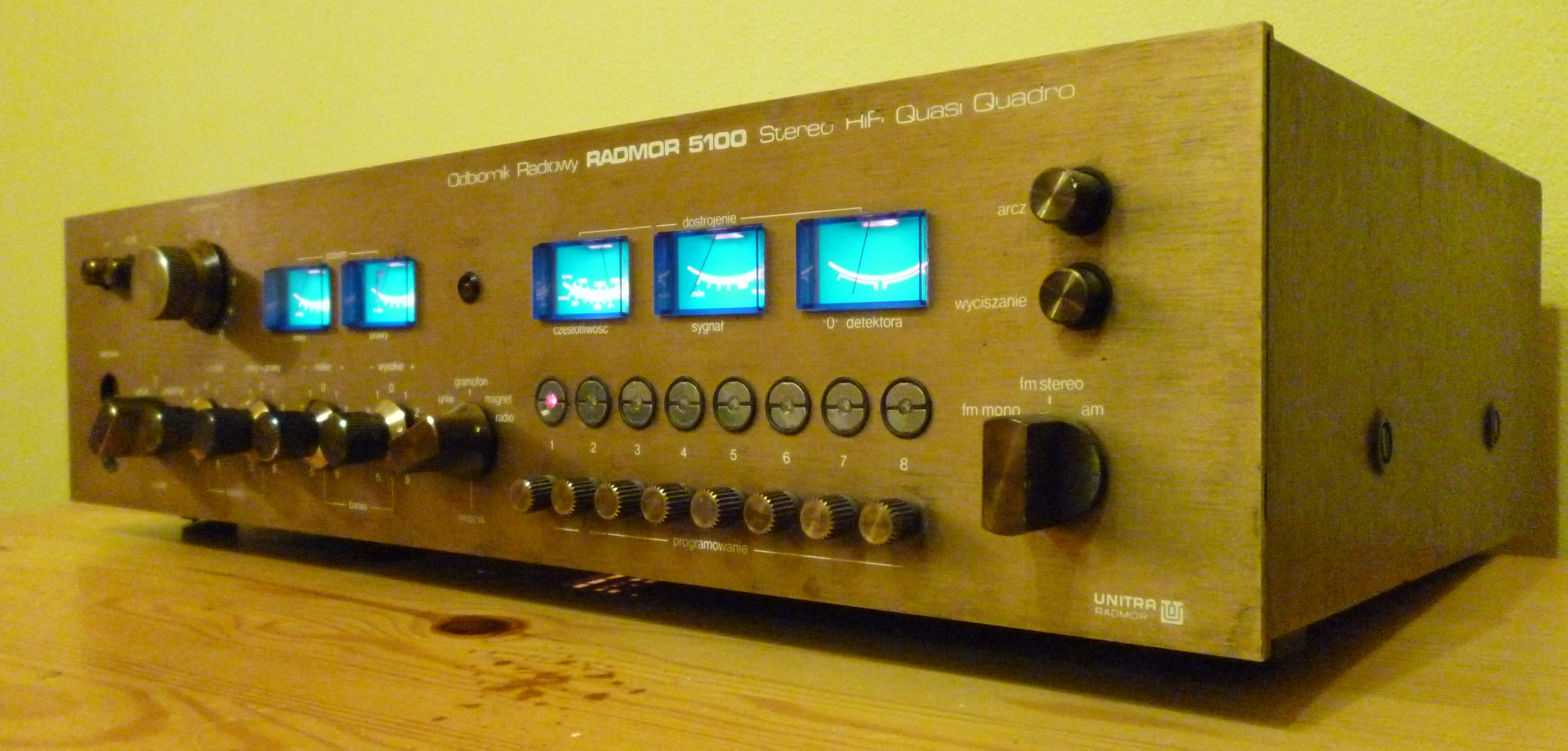 RADMOR 5100 Stereo HiFi Quasi Quadro